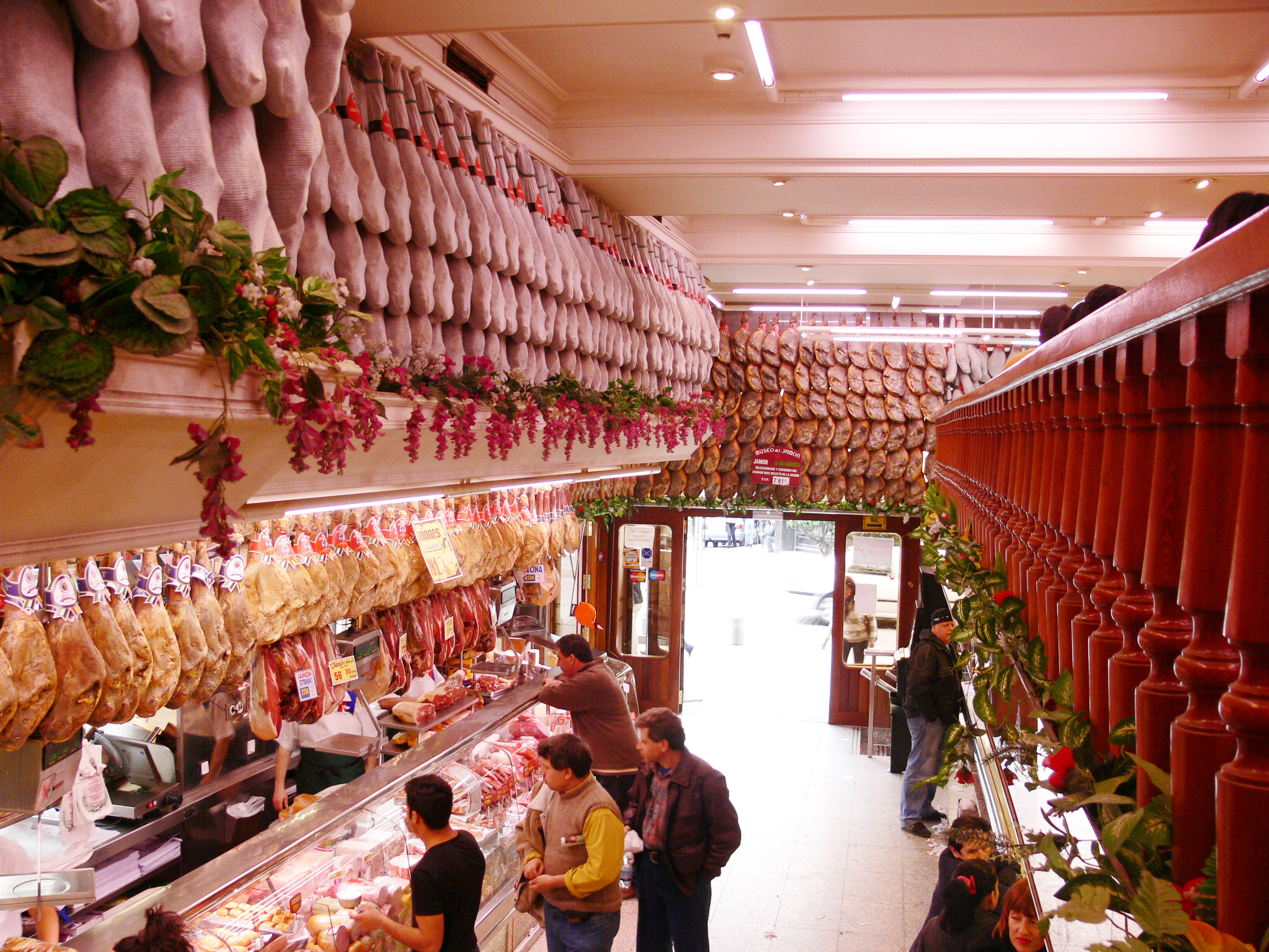 a branch of Museo del Jamón in Madrid